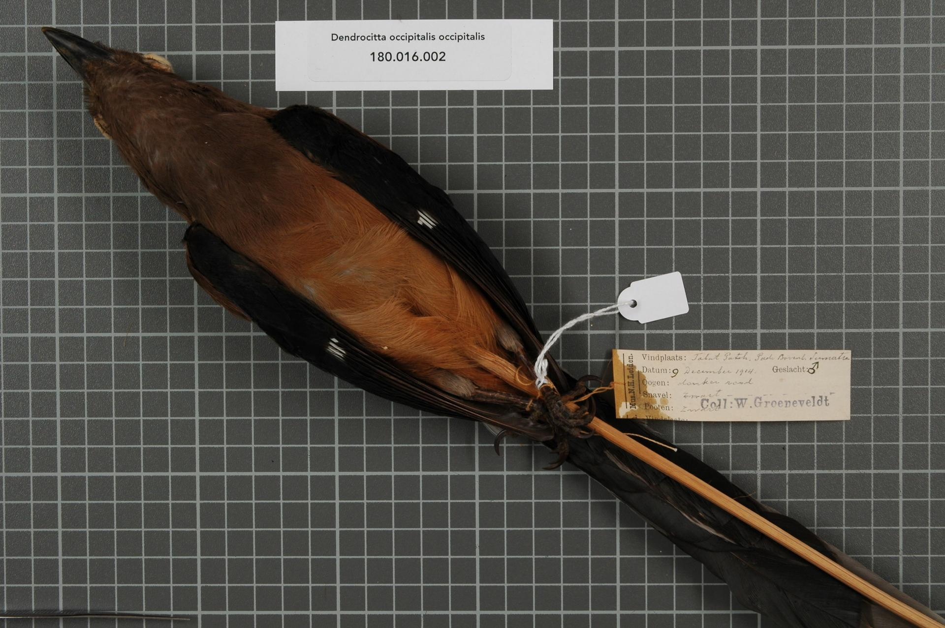 Dendrocitta occipitalis occipitalis (Muller, 1835)